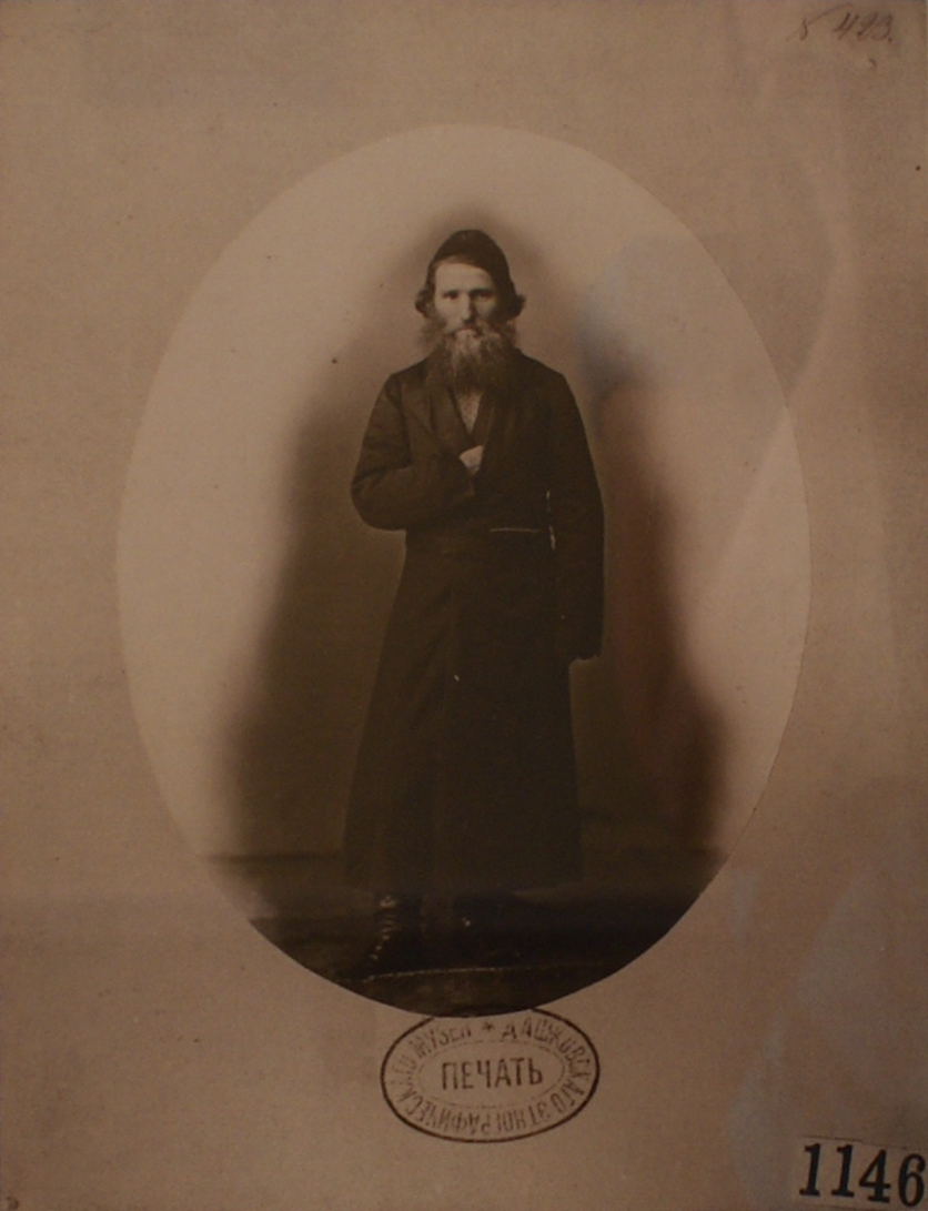 Купец Ісаксан. Магілёўская губерня. Копія. Арыгінал у Расійскім этнаграфічным музеі.